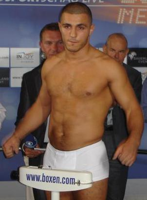 Boxer Alexander Frenkel